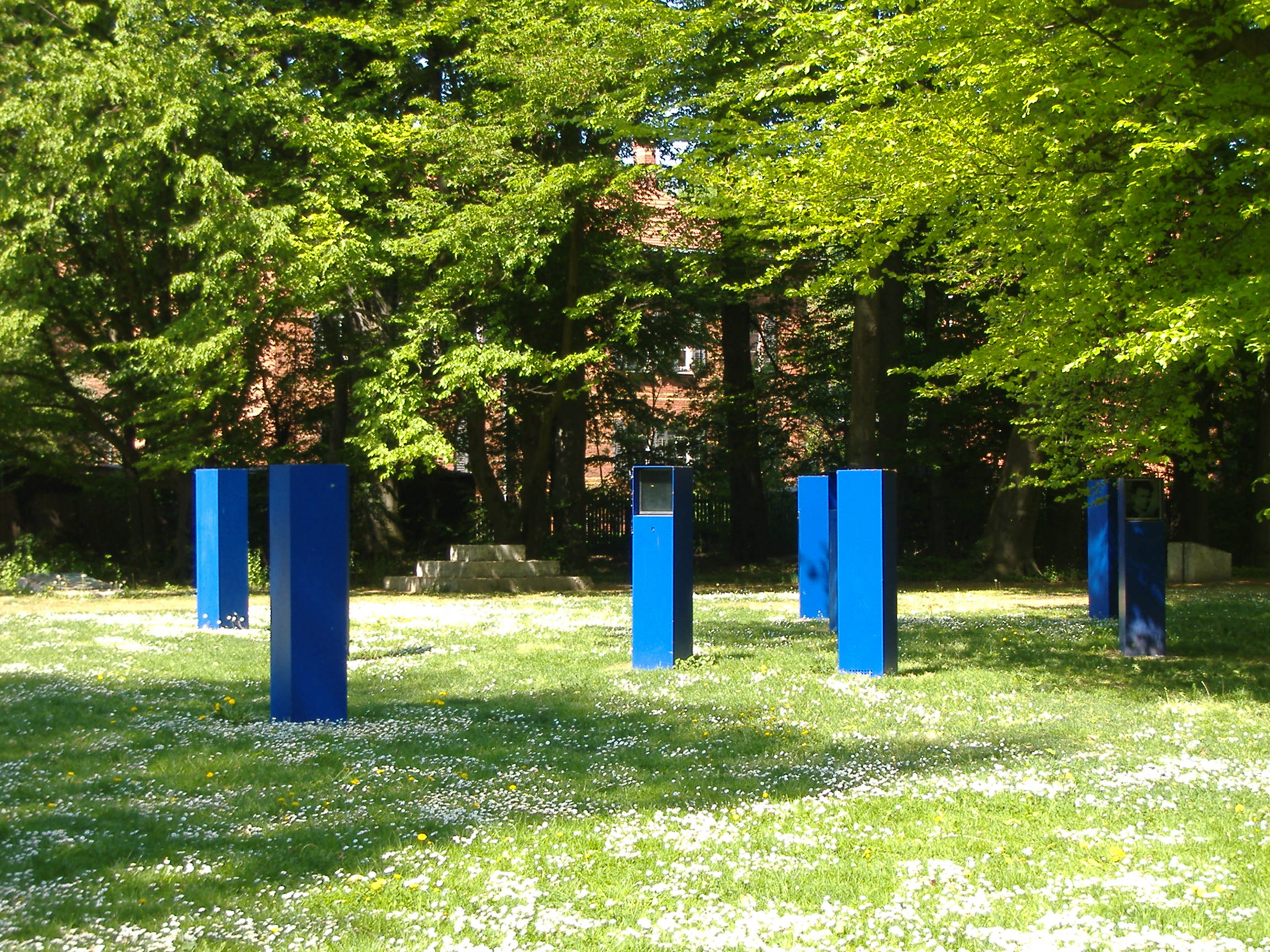 Mahnmal für die Opfer des Nationalsozialismus in Ingolstadt by Dagmer Brachter (1998/99), installed in the Luitpoldpark.